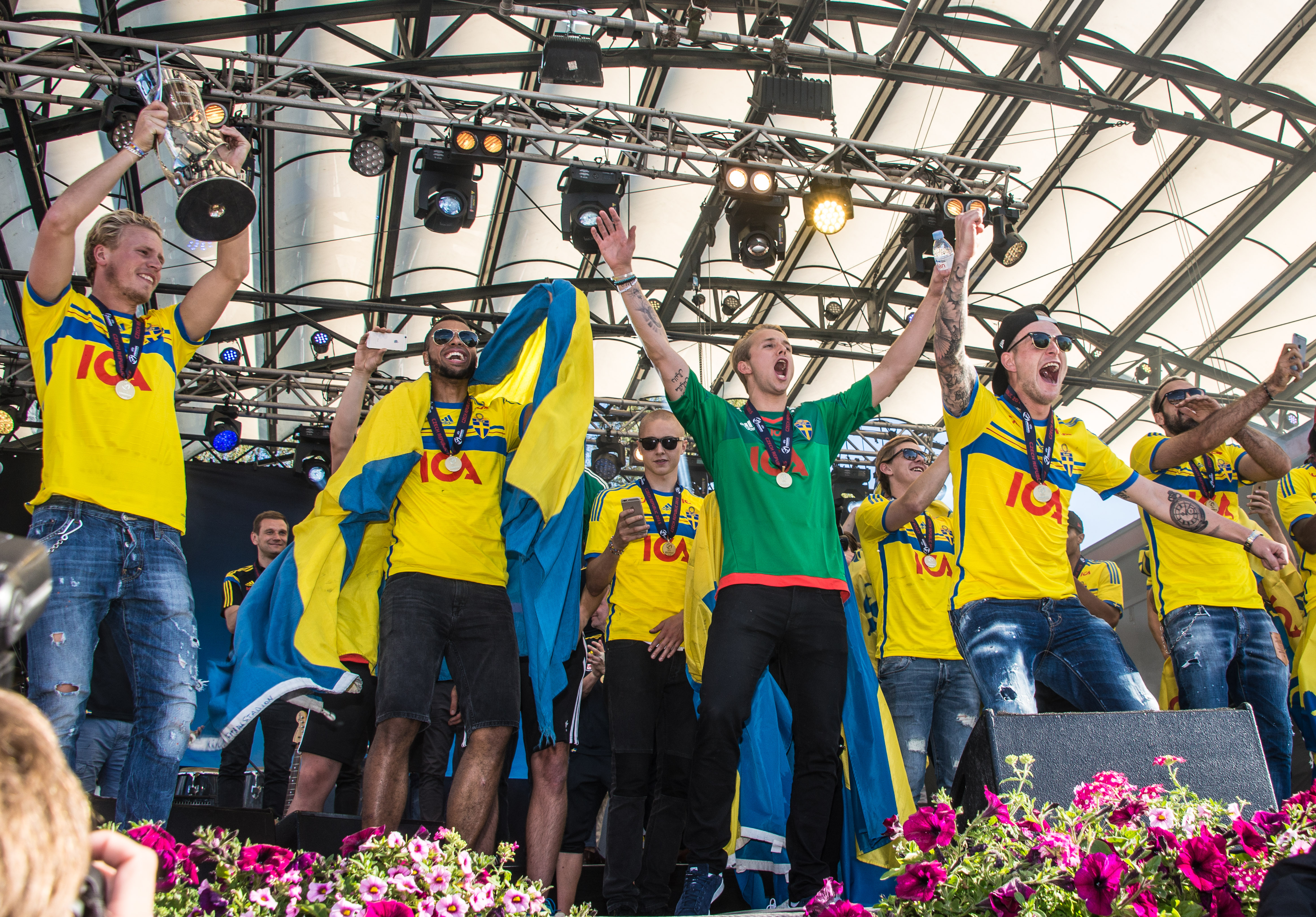 Sveriges U21-landslag blir hyllade i Kungsträdgården i Stockholm den 1 juli av 1000-tals fans efter guldet i U21-Europamästerskapet i fotboll 2015.